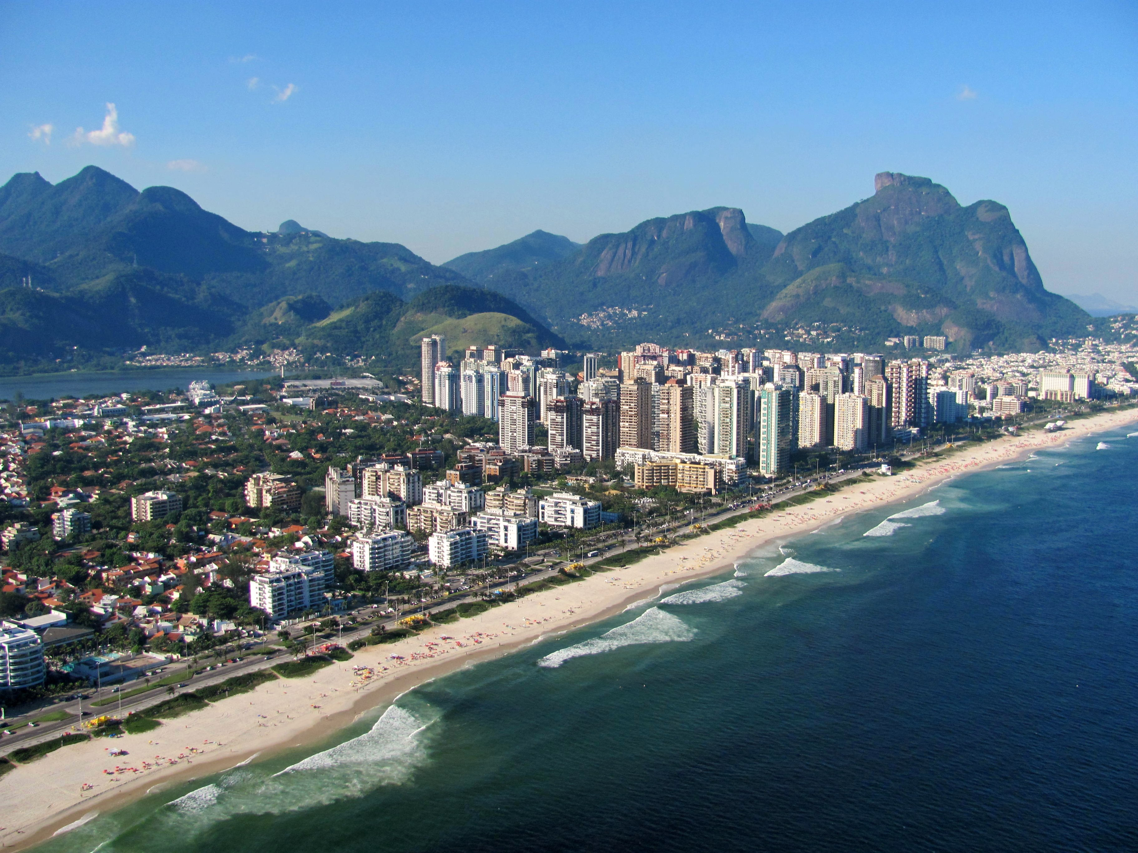 São 18 de parai